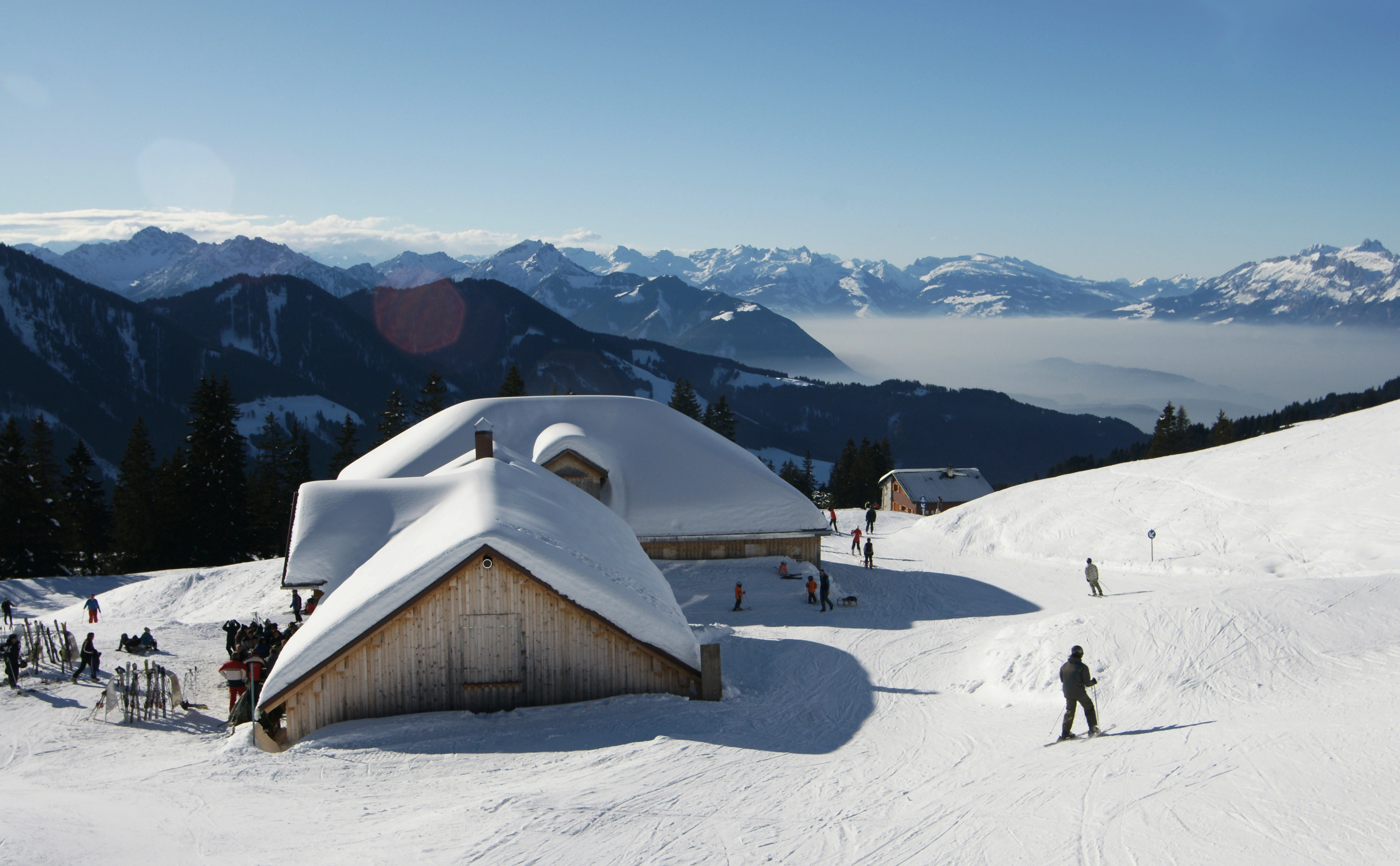 Die Gapfohlalpen im Skigebiet Laterns-Gapfohl mit Blick auf die Schweizer Berge des Alviers, Churfirsten und Altmann. Im Rheintal Nebel